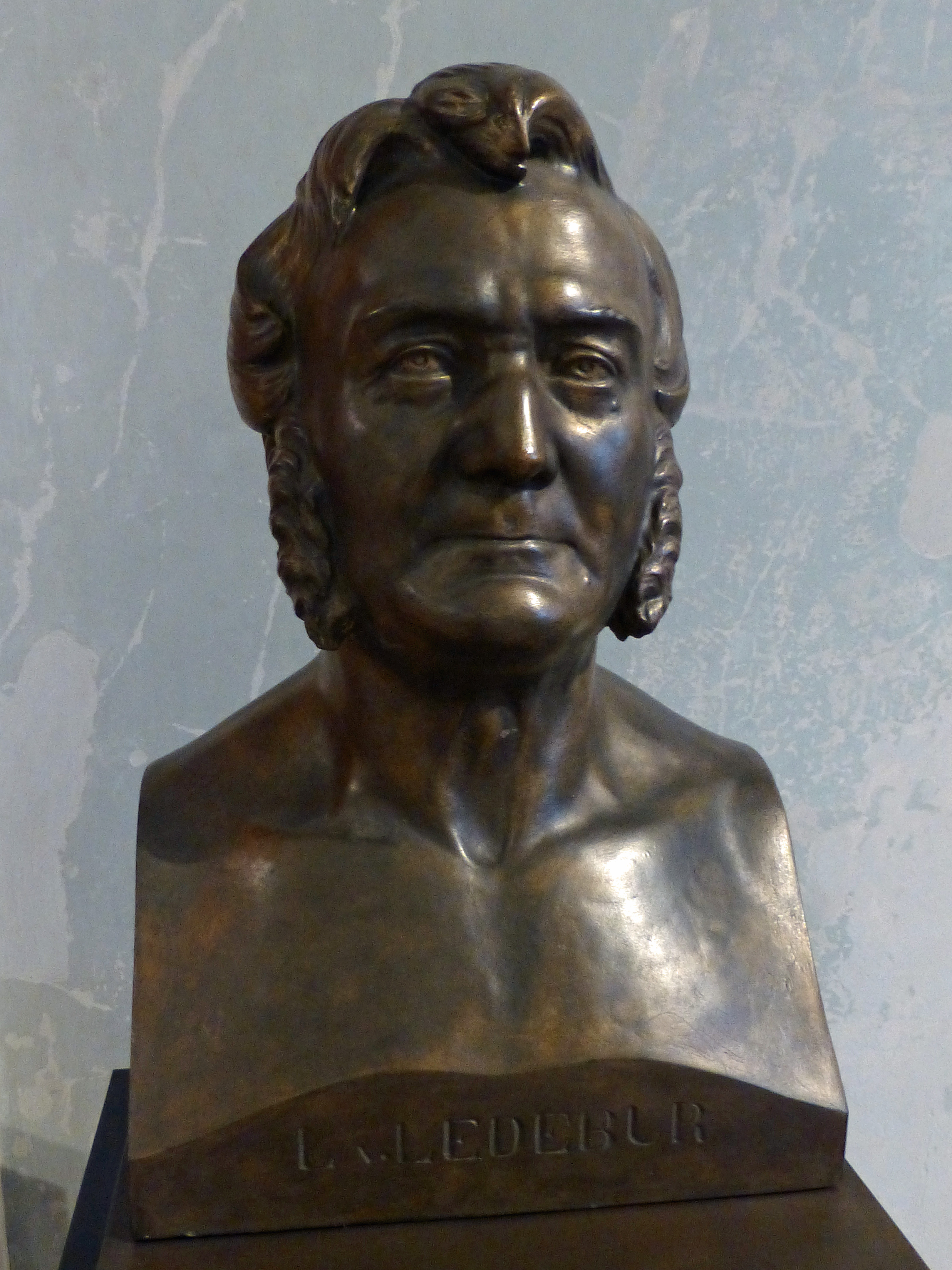 Neues Museum (Berlin) : Leopold Freiherr von Ledebur (1799-1877). Gips, koloriert. Heinrich Freiherr von Ledebur, 1877